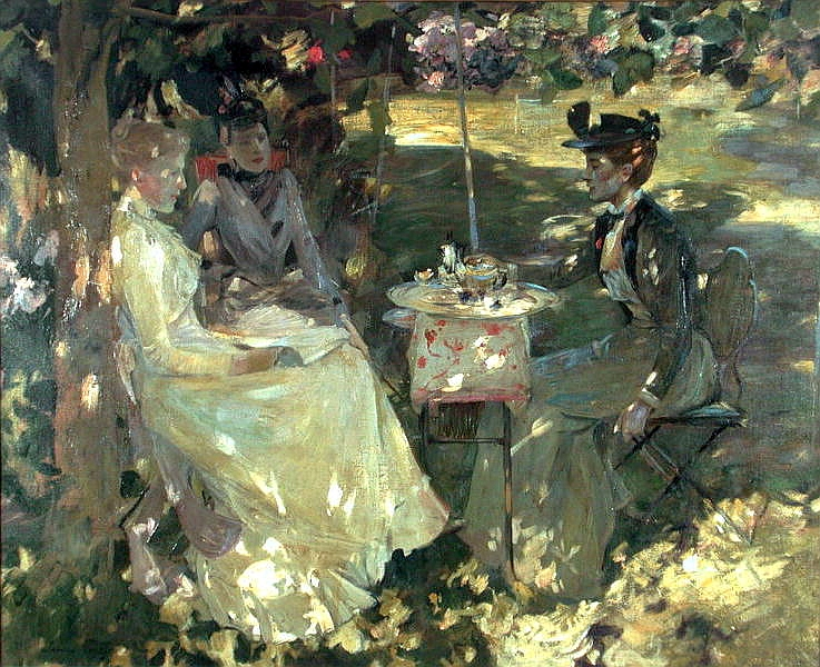 Midsummer